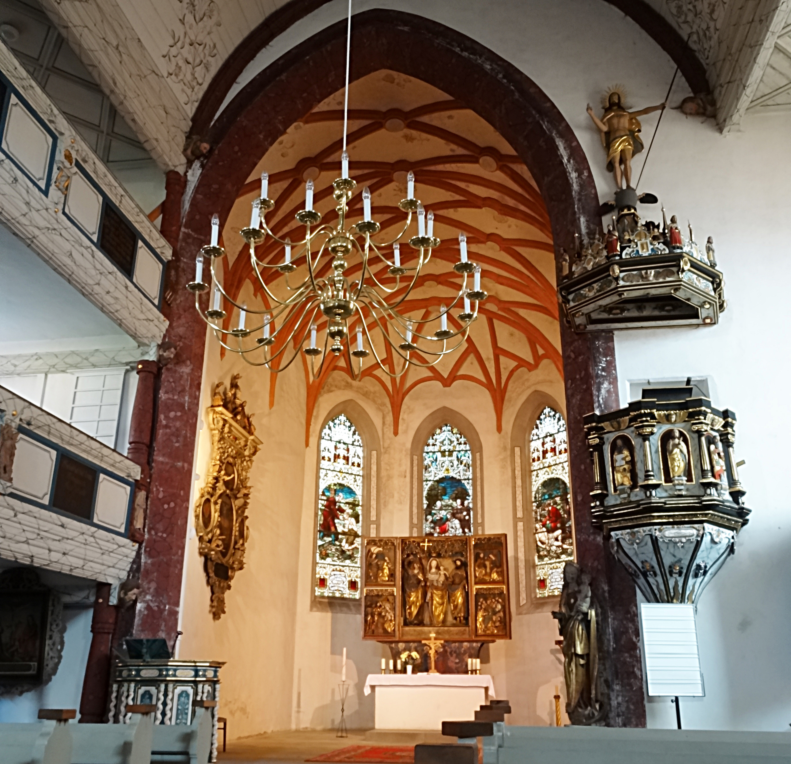 eine der am reichsten ausgestatteten Kirchen des oberen Werratals